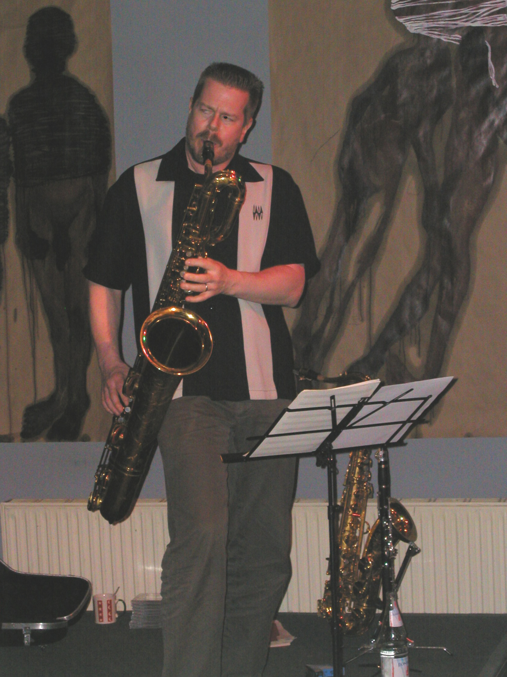 Ken Vandermark mit dem "Free Music Ensemble" am 15.5.2004 im Club W71 in Weikersheim